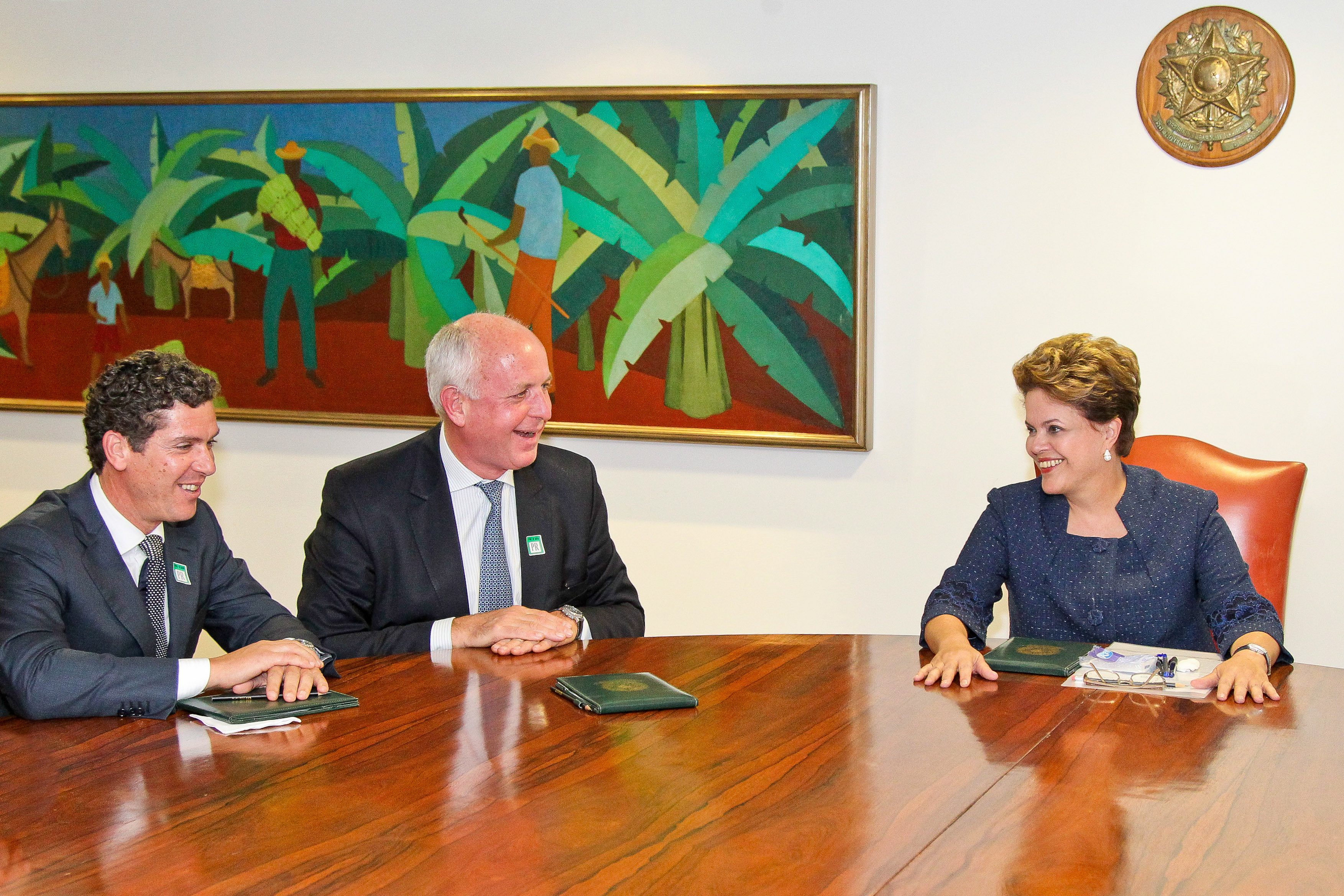 Presidenta Dilma Rousseff durante encontro com Thierry Peugeot, Presidente do conselho de Administração do grupo PSA Peugeot Citroen, no Palácio do Planalto. (Brasília - DF, 26/10/2011)